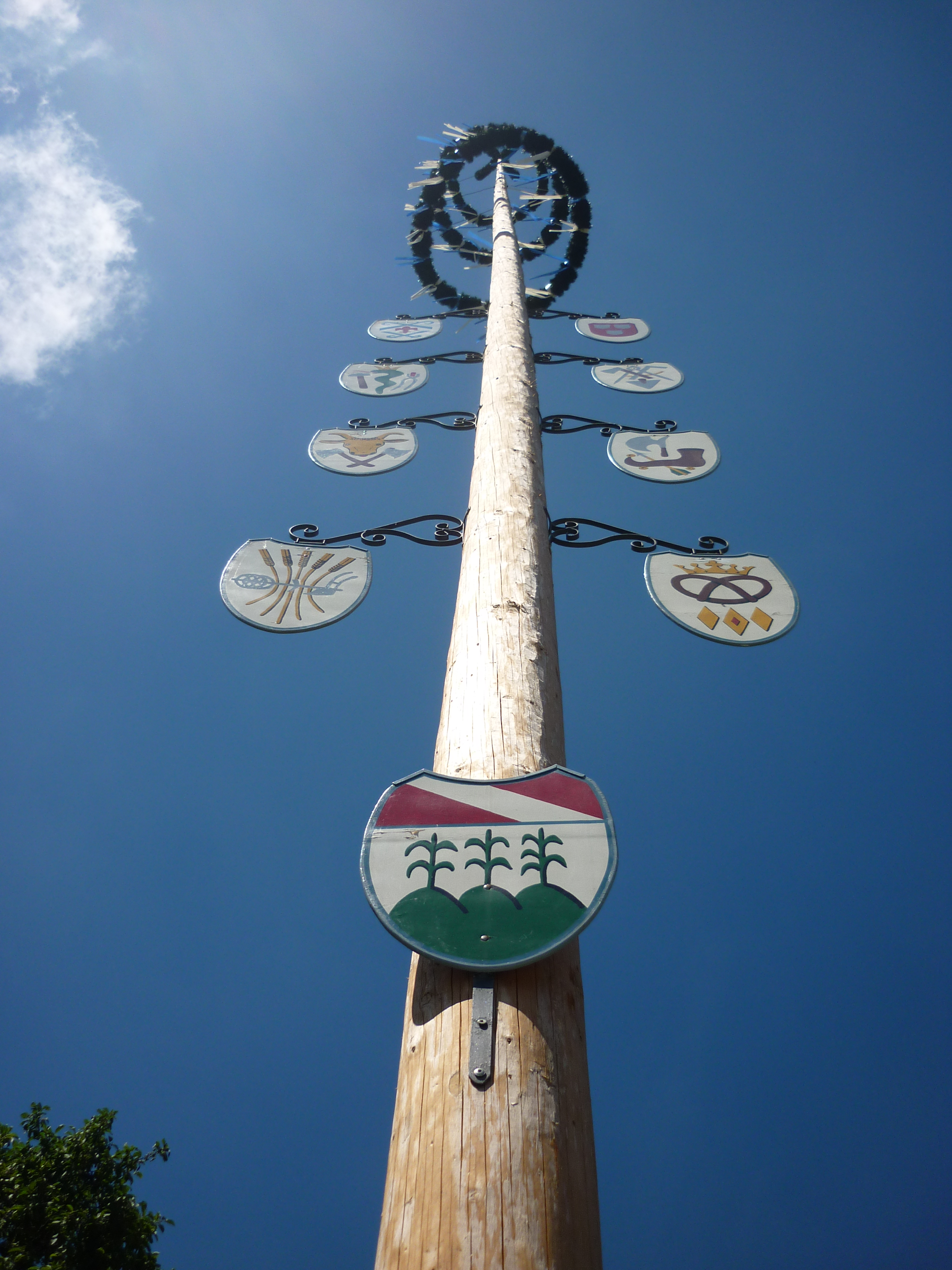 Maibaum Wörth an der Donau